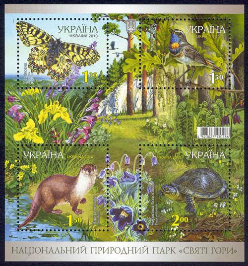 Блок "Національний природний парк «Святі гори»" з чотирьох марок